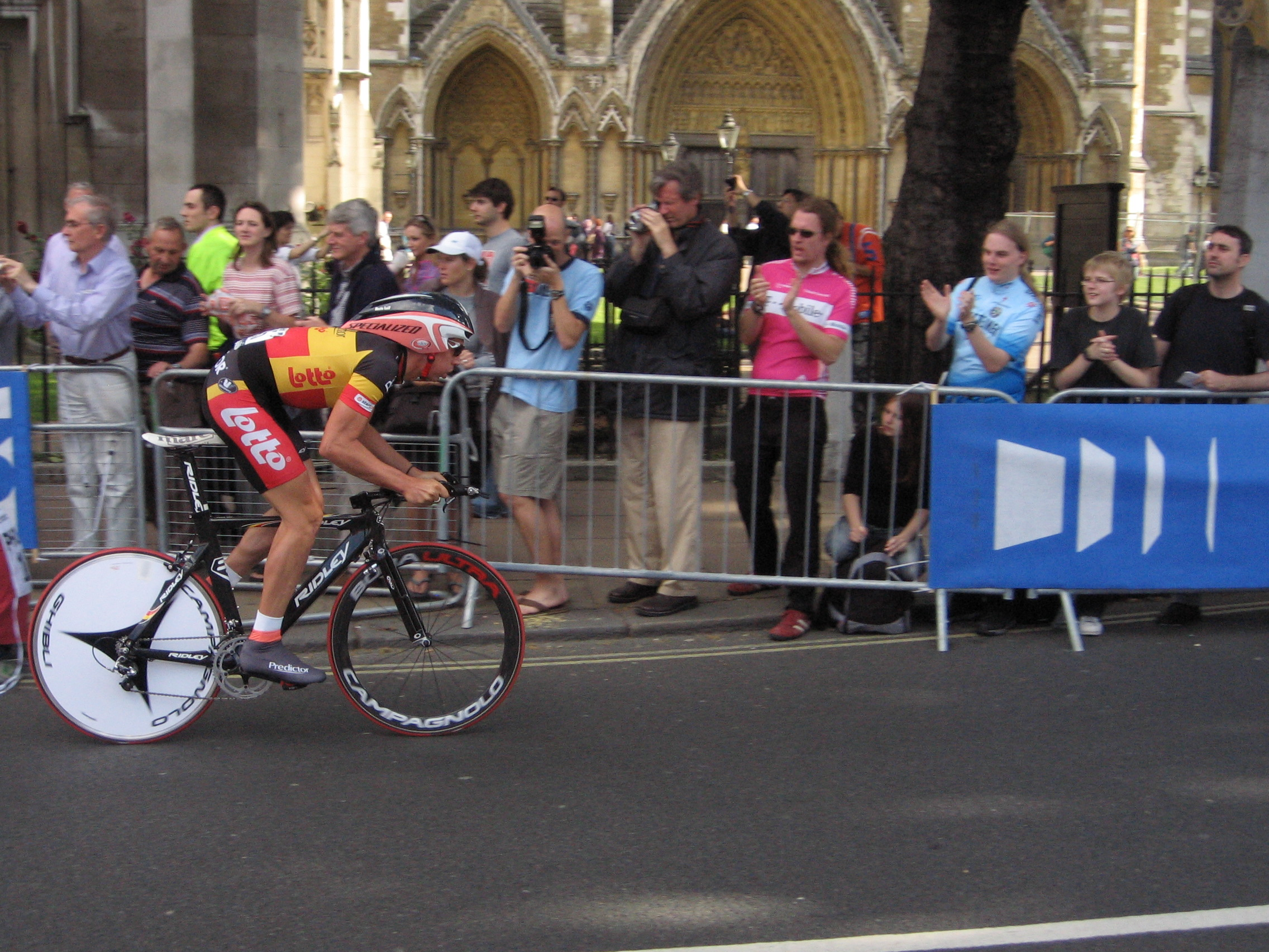 Leif Hoste, Belgian time trial champion